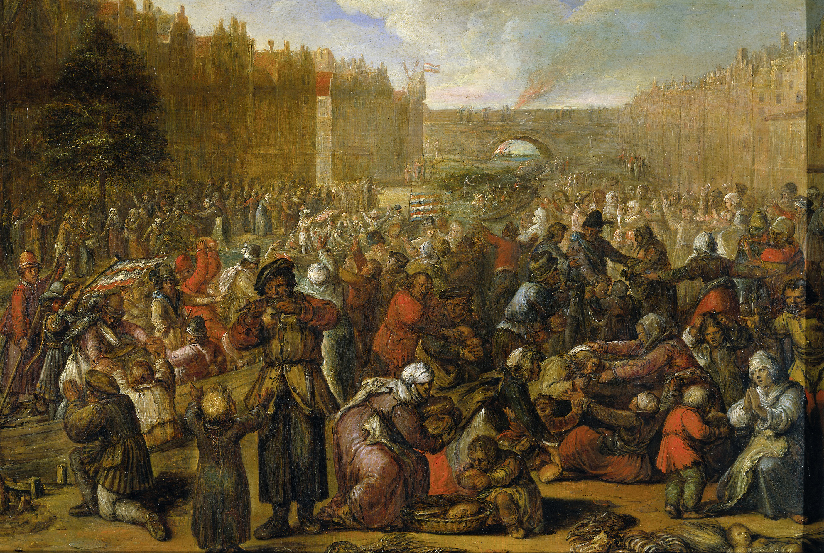 De uitdeling van haring en wittebrood na de opheffing van het beleg van Leiden, 3 oktober 1574. Gezicht in Leiden waar de boten van de Geuzen over de rivier de Vliet haring en witbrood aanvoeren en uitdelen onder de verhongerde bevolking van de stad.